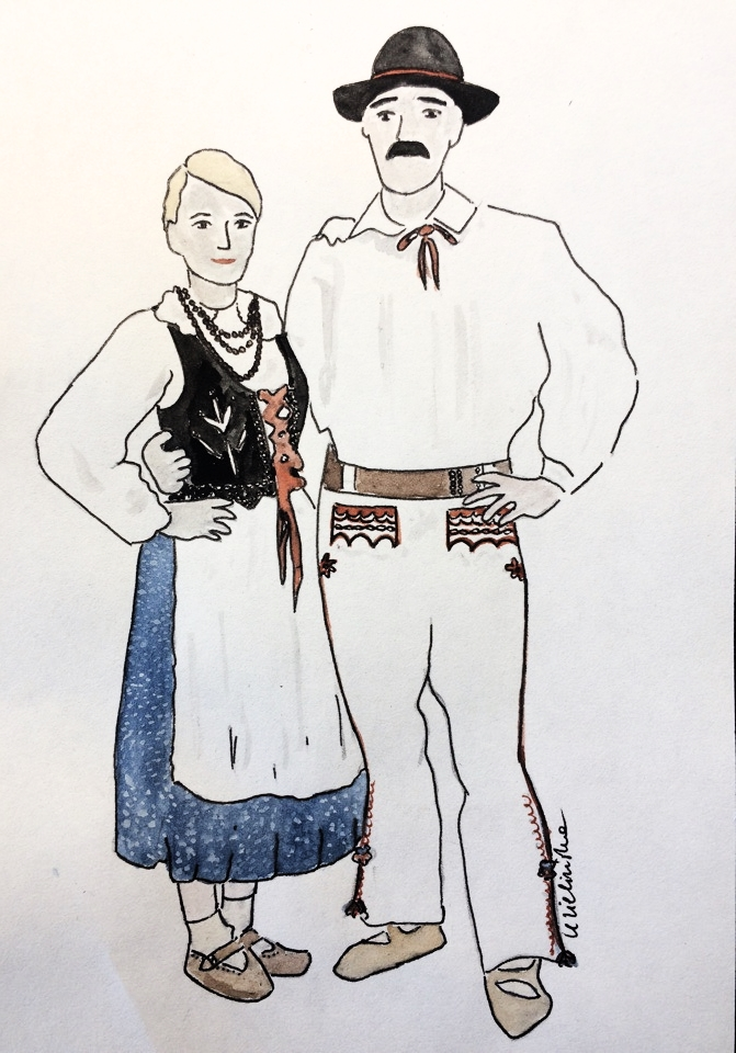 Górale Kliszczaccy w tradycyjnym ubiorze